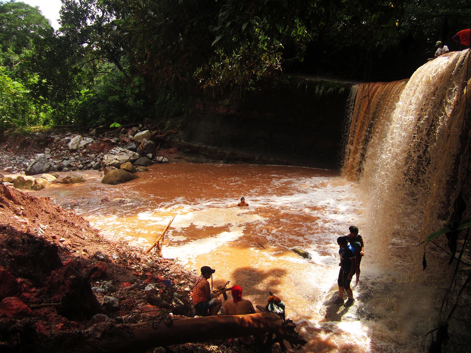 Piscina natural en Cortina de Uchiza